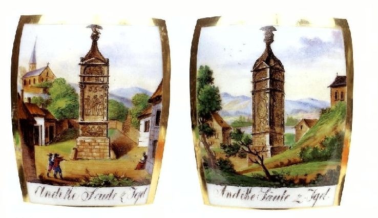 Kaffeekanne, zwei Ansichten "Igeler Thurm bey Trier" (Stadtmuseum Simeonstift Trier)